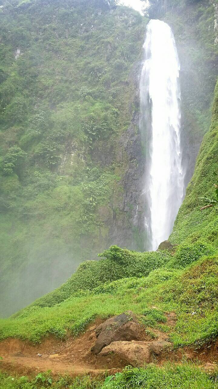 Waterfall citambur